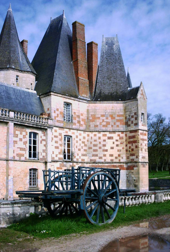 Château d'Ô, Mortrée, Orne, Normandie, France.